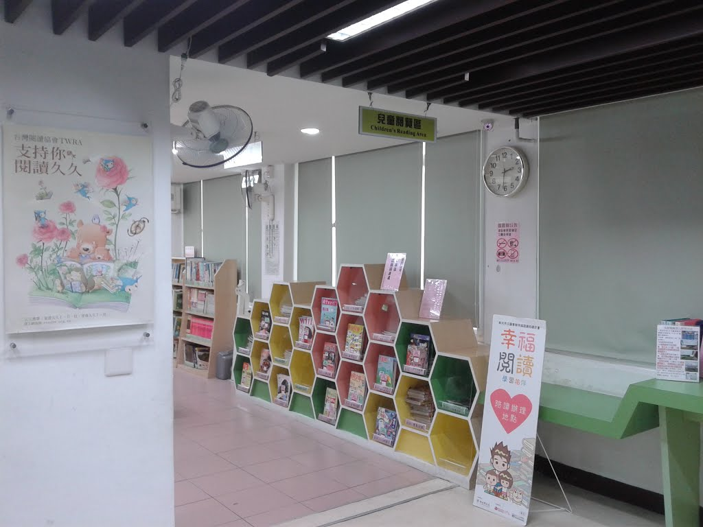 新北市立圖書館板橋分館 兒童室。